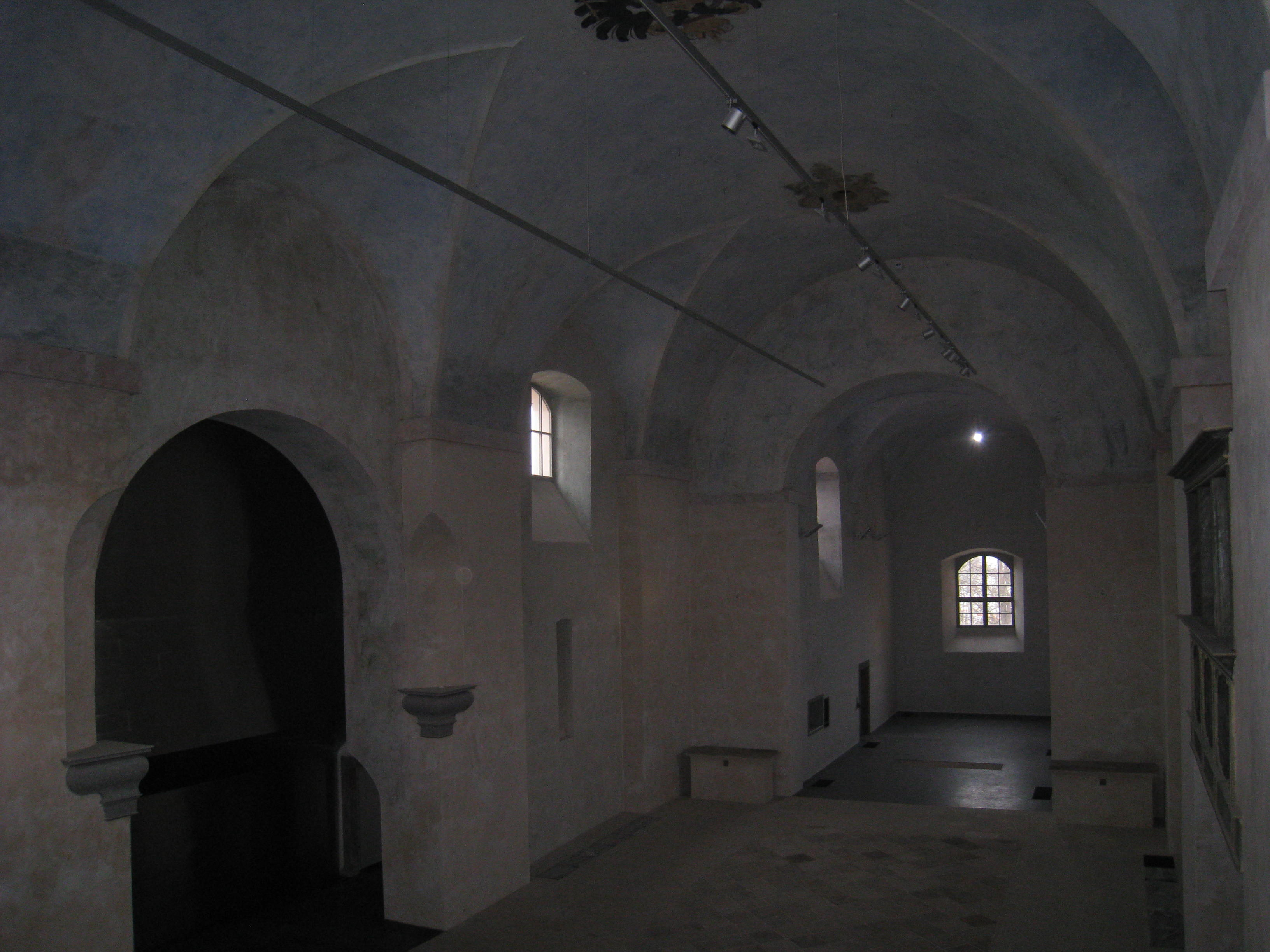 Pohled na hlavní loď kostela sv. Josefa v Chrudimi, nyní Muzea barokních soch, před zahájením instalace interiérů a po provedené rekonstrukci v letech 2009-2010.